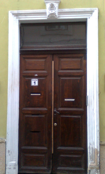 Bolyai János kolozsvári szülőháza